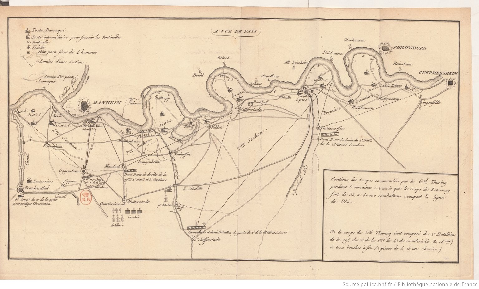 Carte représentant l'emplacement des troupes du général Thüring